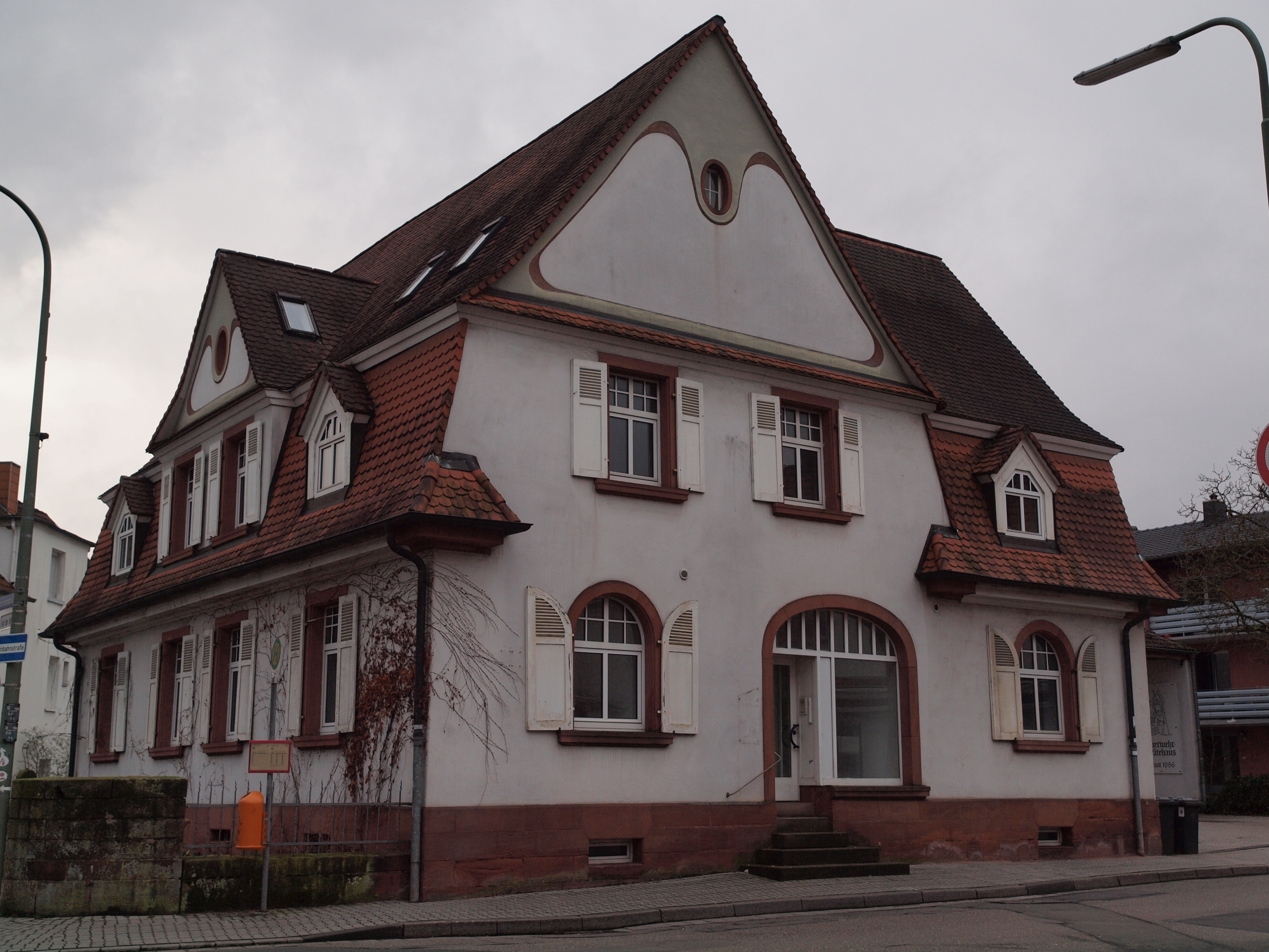 Wohnhaus, Auf der Brücke 15